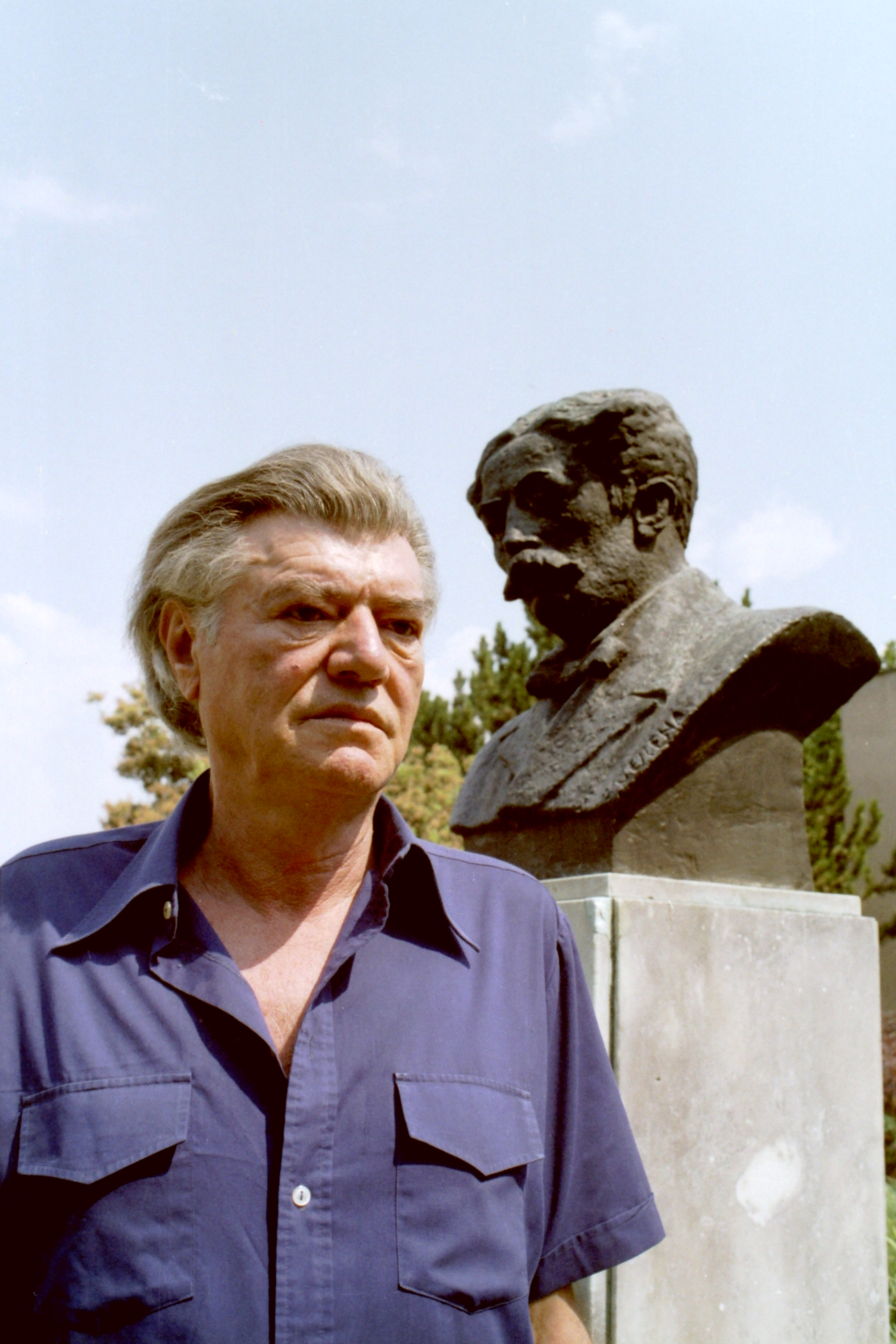 Pesnik i akademik Stevan Raičković, kraj spomenika akademiku i piscu Stevanu Sremcu, Senta, juli 1995. foto: Stevan Kragujević (po odobrenju kćerke Tanje Kragujević)